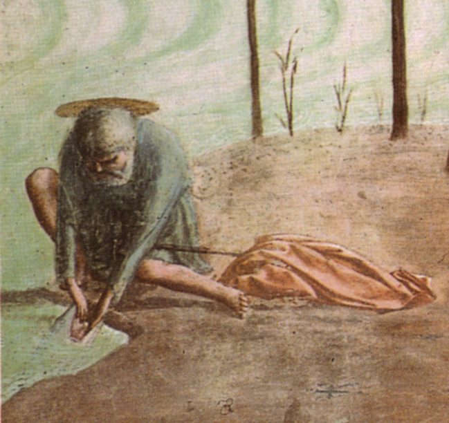 Cappella brancacci, Pesac di Pietro, dettaglio (restaurato), Masaccio